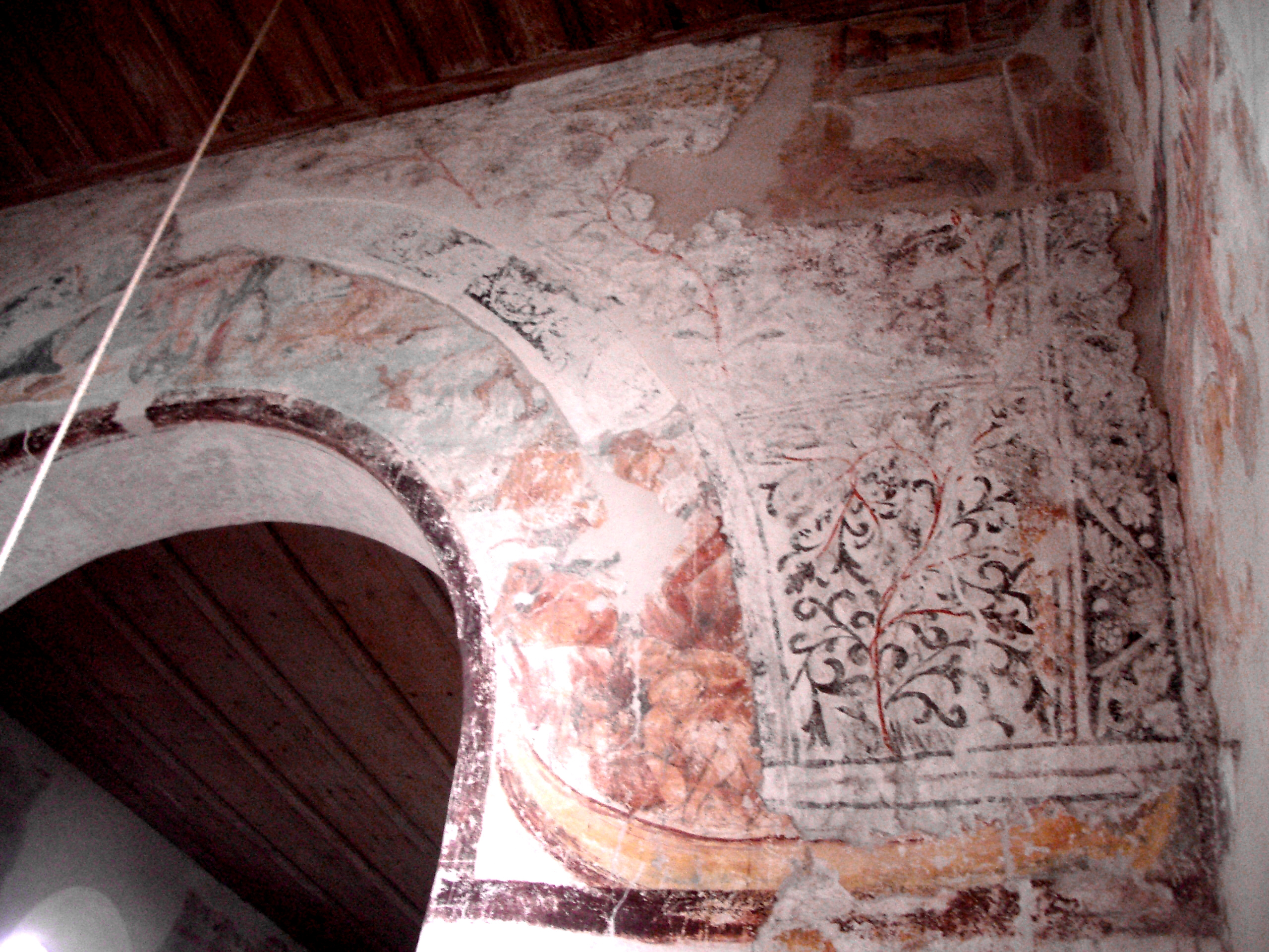 Überlingen, Germany: Kapelle St. Sylvester in Goldbach